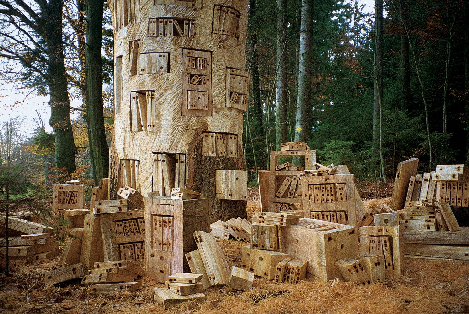 Pappel-Archiv 321-teilig, 200 Jahre Schlacht bei Grauholz (1798) und 150 Jahre moderner Bundesstaat (1848) sind Anlass die Archive zu öffnen. (für den Skulpturenweg Grauholz, Bern, 1998)